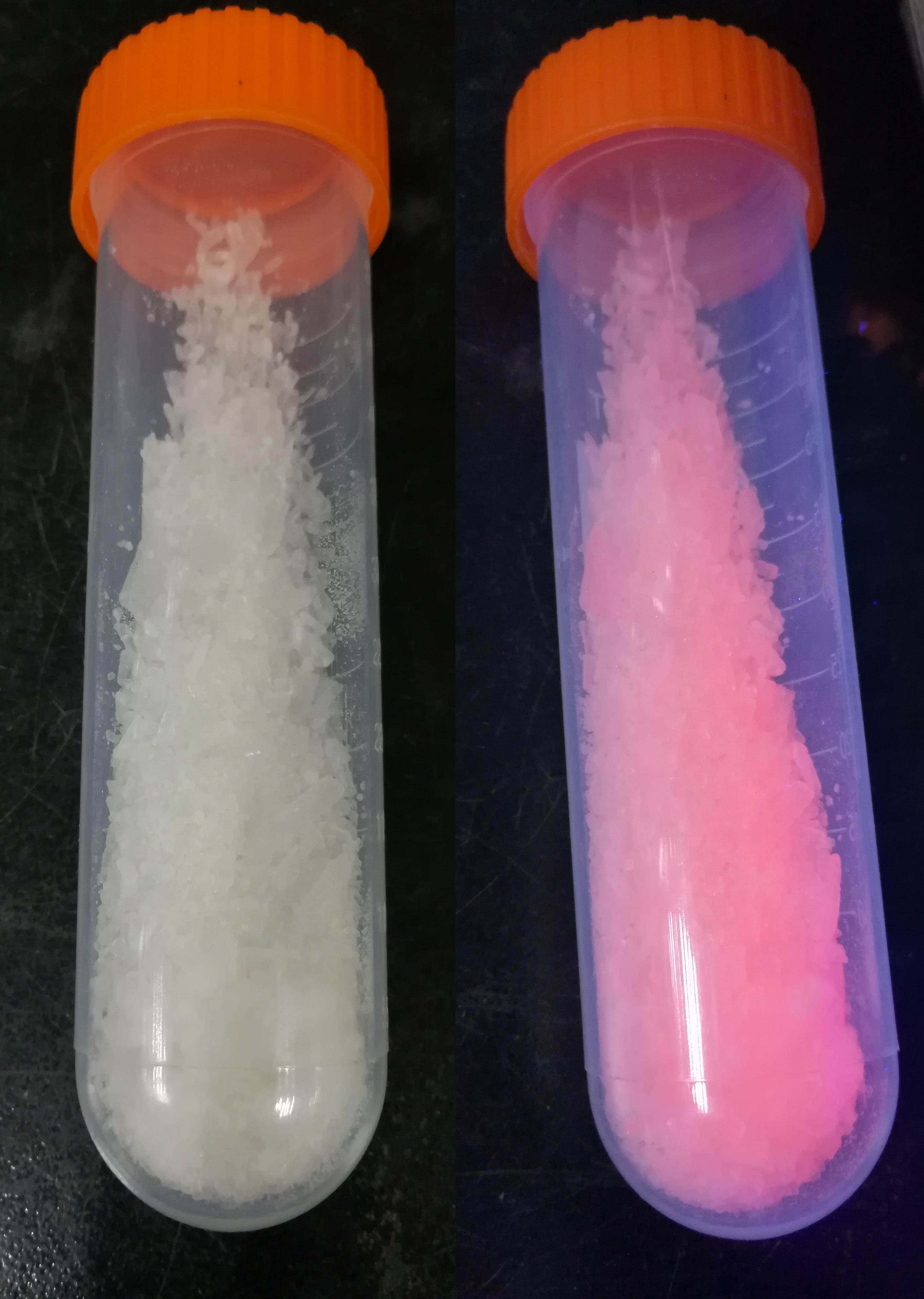 左：正常光下，右：UV灯365长波。粉色光可能来自离心管的干扰。无离心管的照片参见这里。